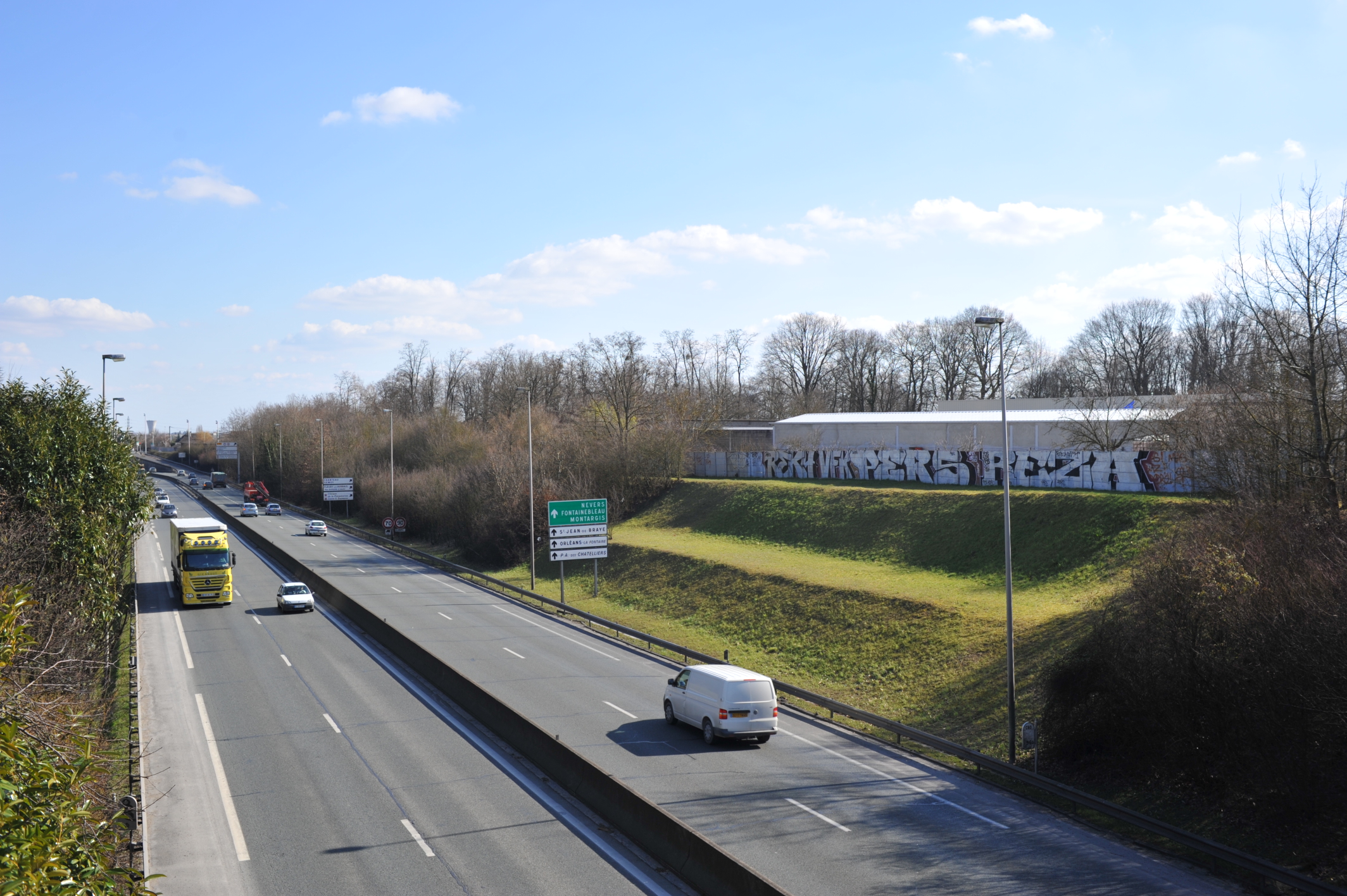 Tangentielle d'Orléans vue du pont de la rue des Fossés vers l'est, Fleury-les-Aubrais, Loiret, France